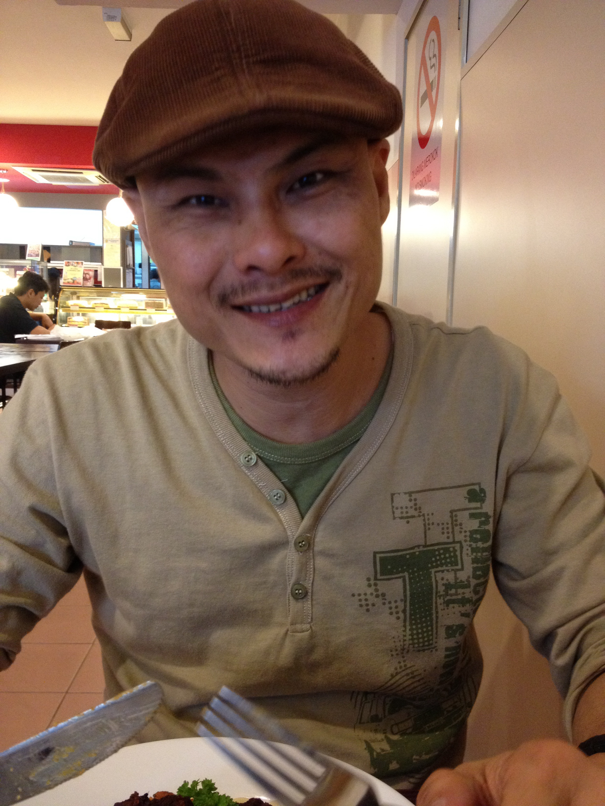 Gambar peribadi